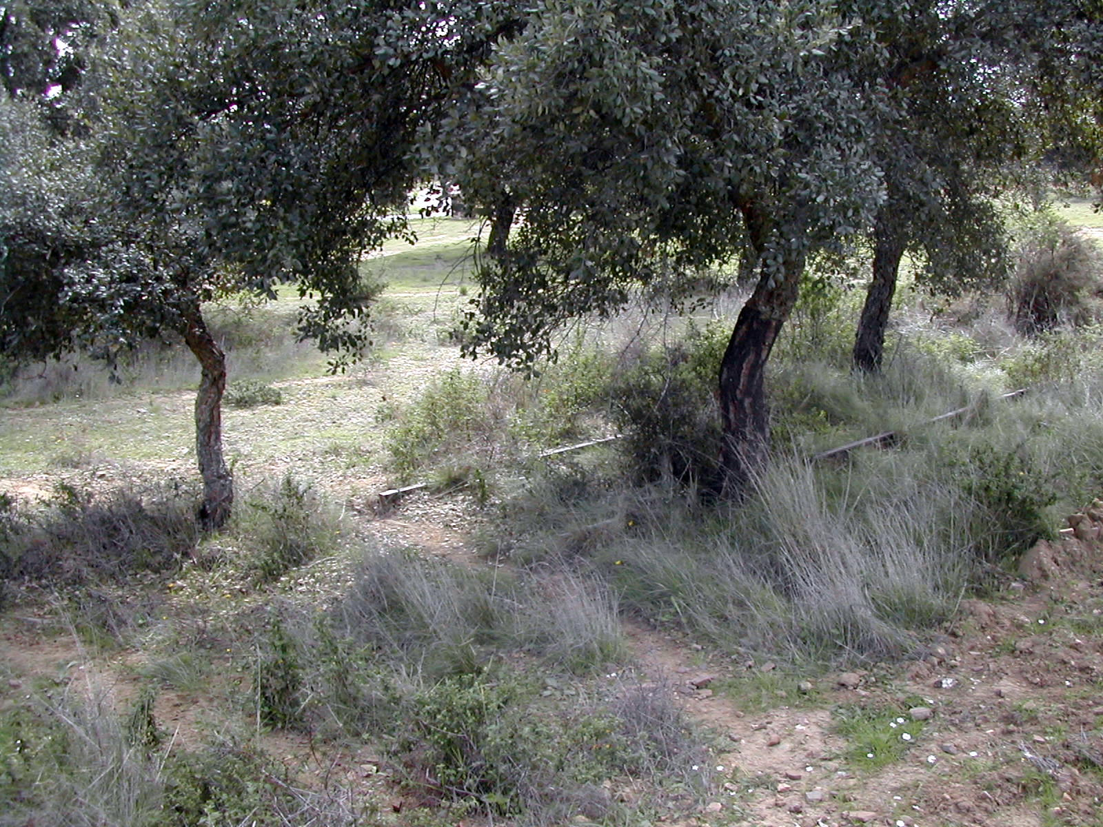 Vestígios da antiga linha Casa Branca-Mina da Nogueirinha, Santiago do Escoural, Montemor-o-Novo, Évora